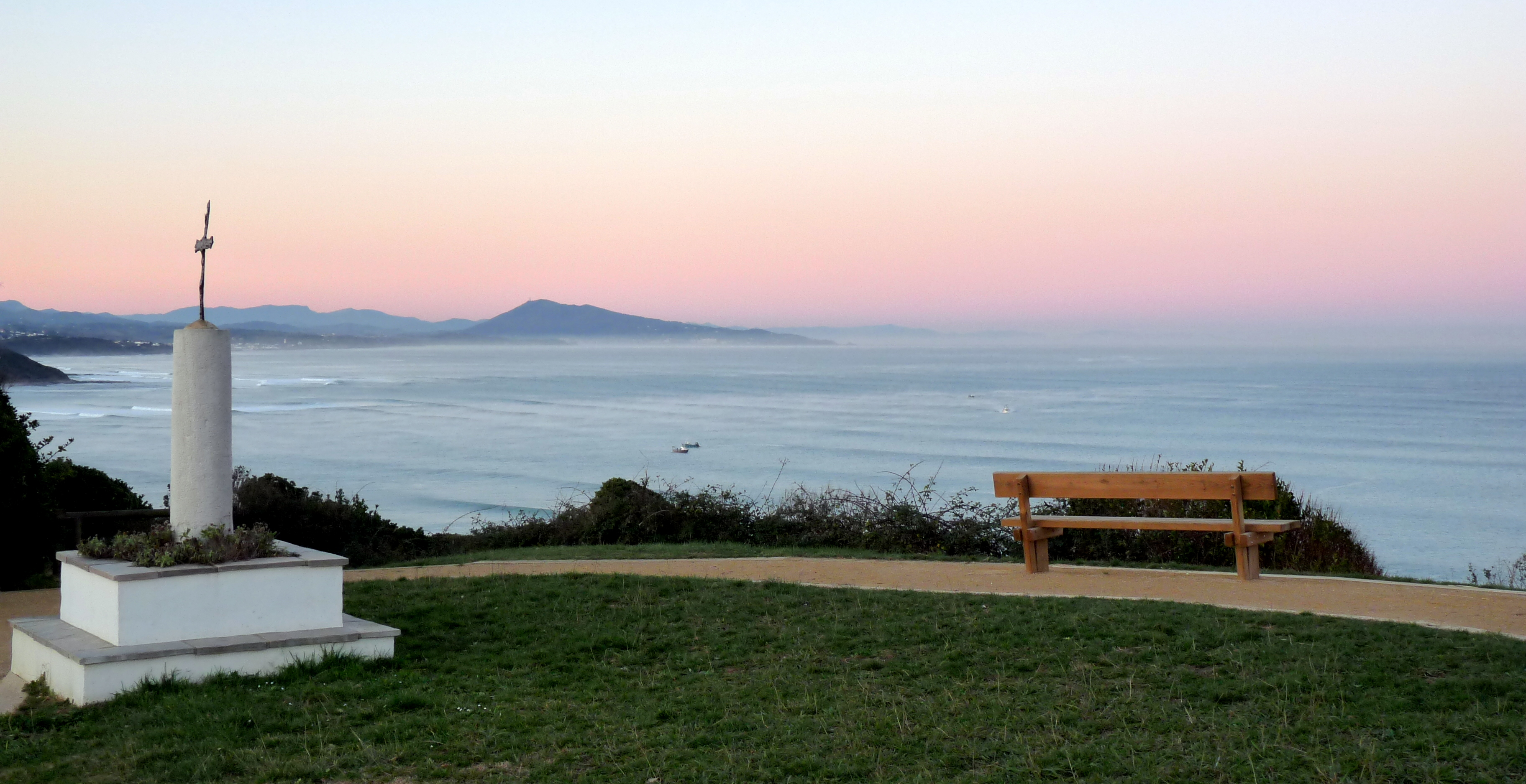 Promenade à proximité de la Chapelle de la Madeleine à Bidart.